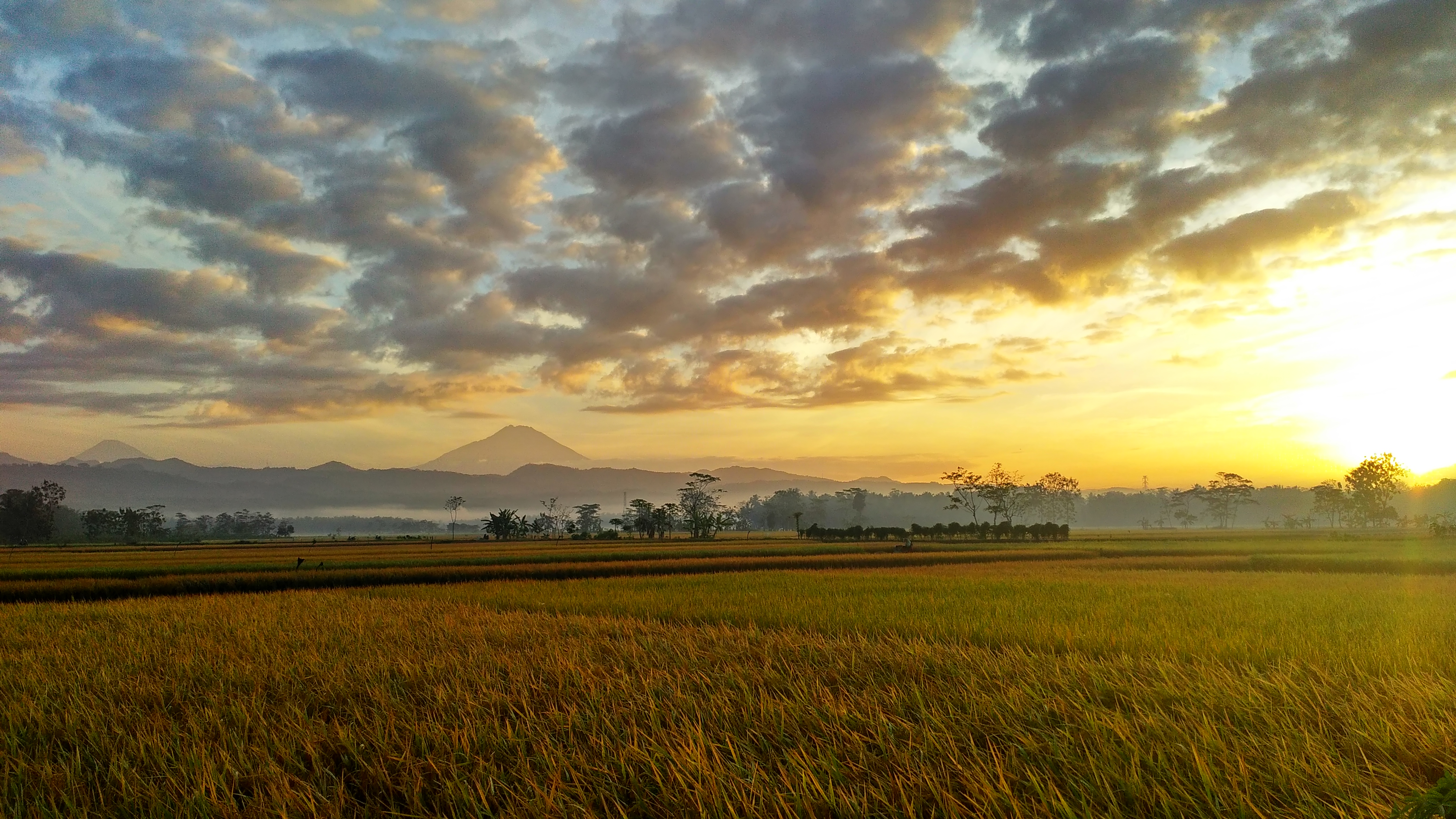 Pemandangan sawah di Desa Ngampel, Kecamatan Pituruh, Kabupaten Purworejo, Jawa Tengah.